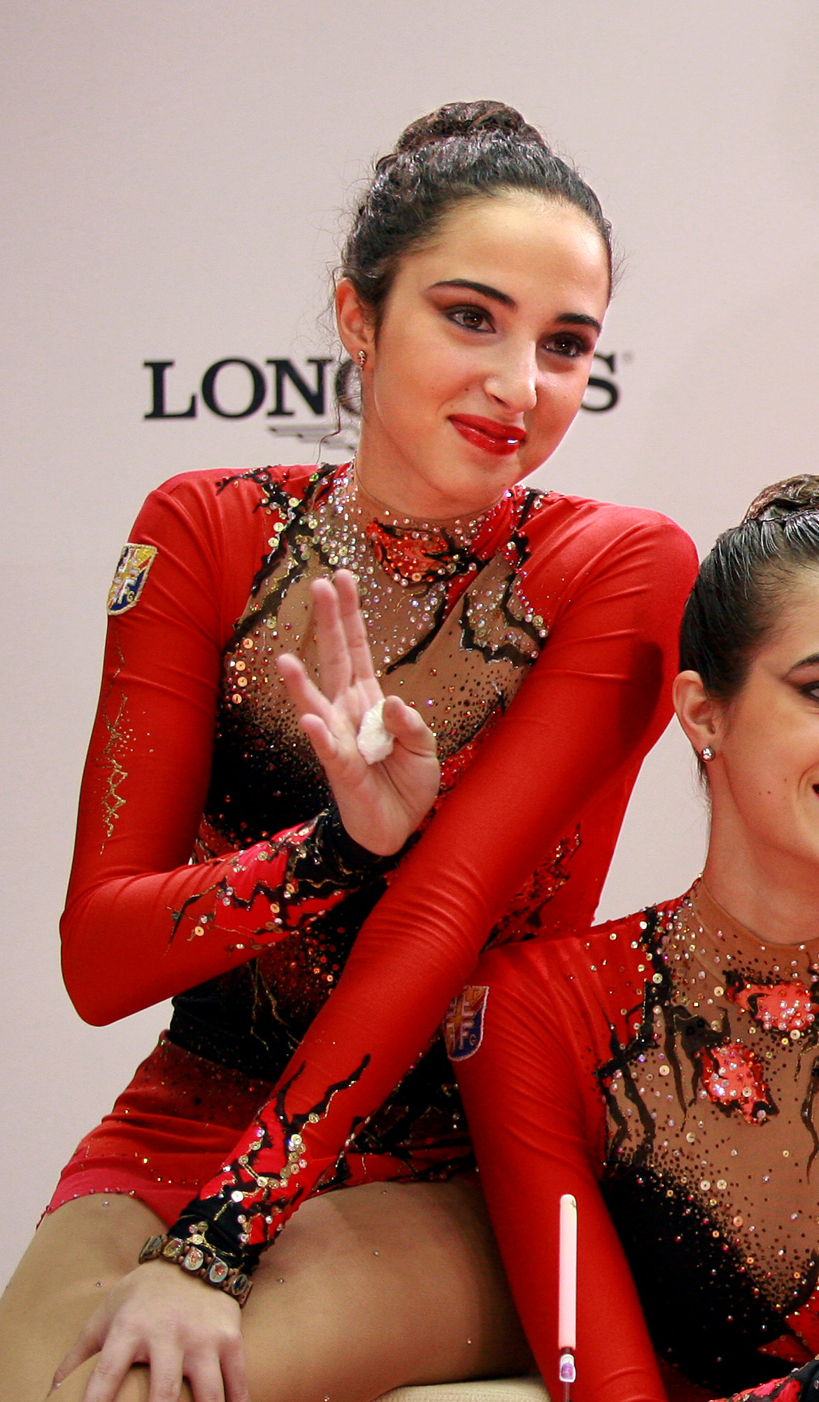 Violeta González en la Final de la Copa del Mundo de 2006 en Mie.